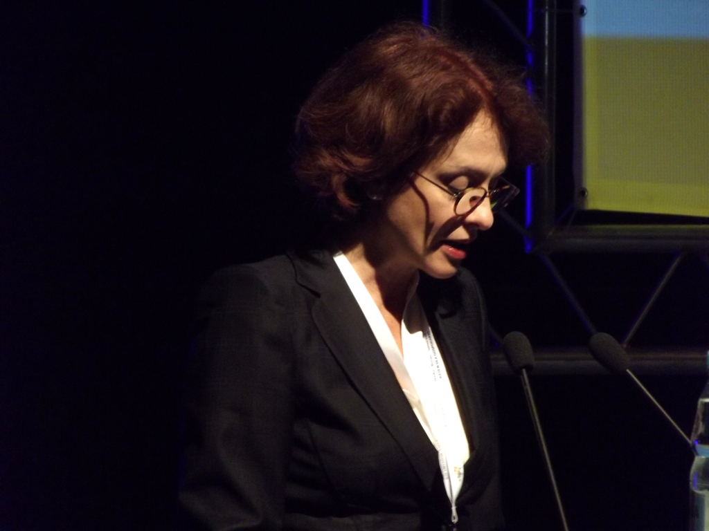 Zdjęcie zrobione podczas III Europejskiego Kongresu Małych i Średnich Przedsiębiorstw w Katowicach.